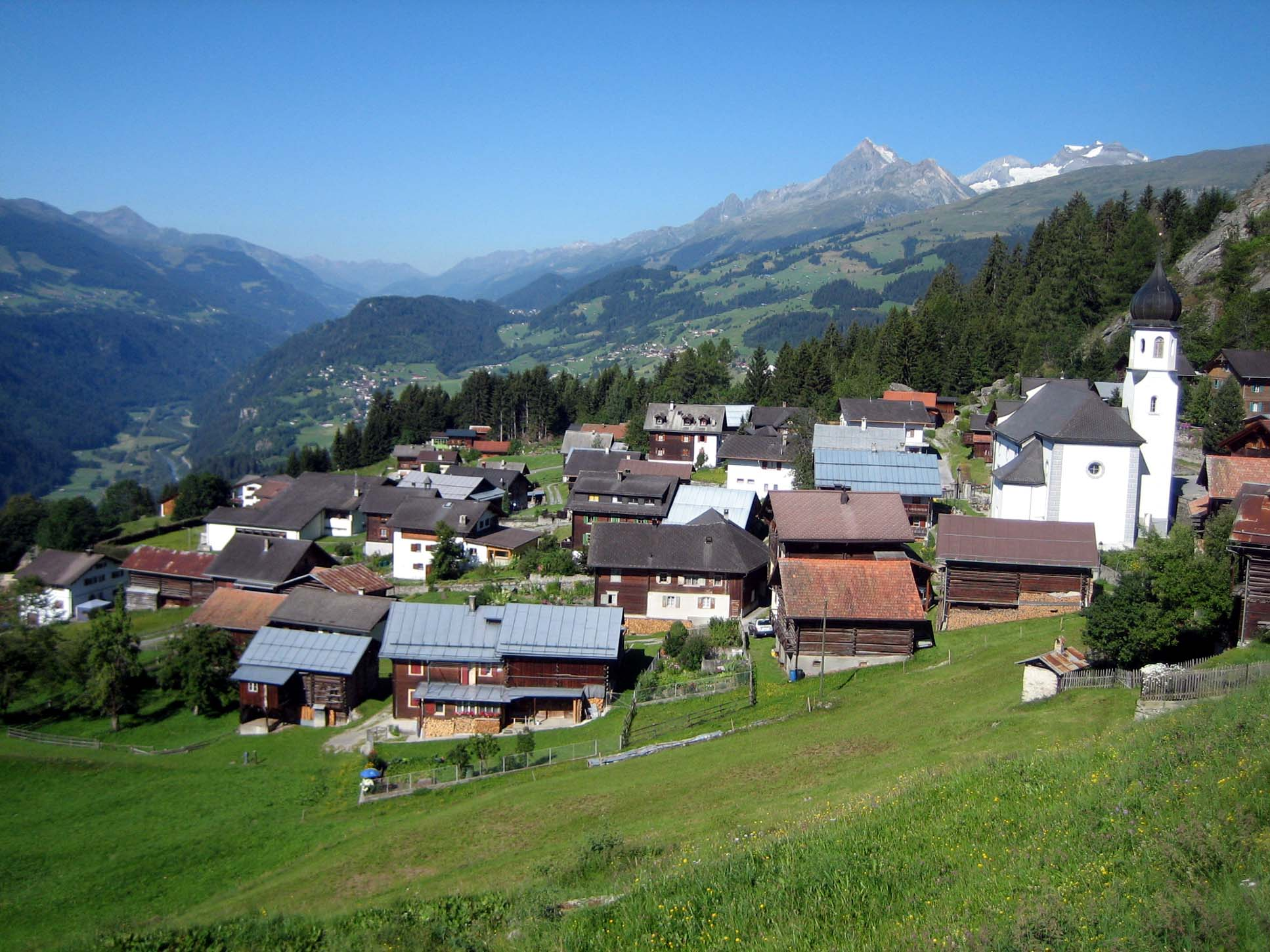 Siat